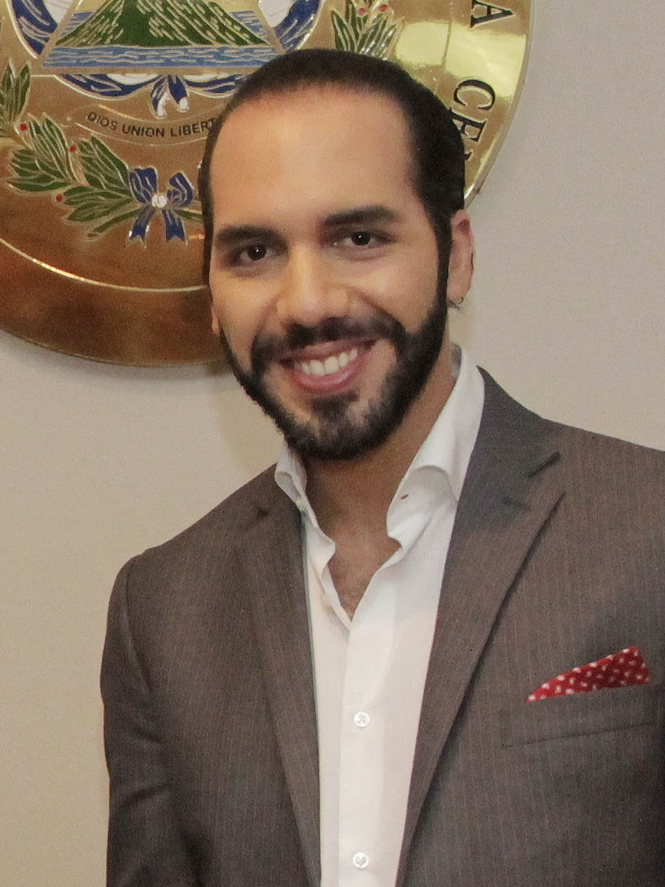 El presidente de El Salvador, Salvador Sánchez Cerén, y el alcalde de San Salvador, Nayib Bukele, durante una reunión sobre temas de cooperación entre el Gobierno central y la comuna capitalina.